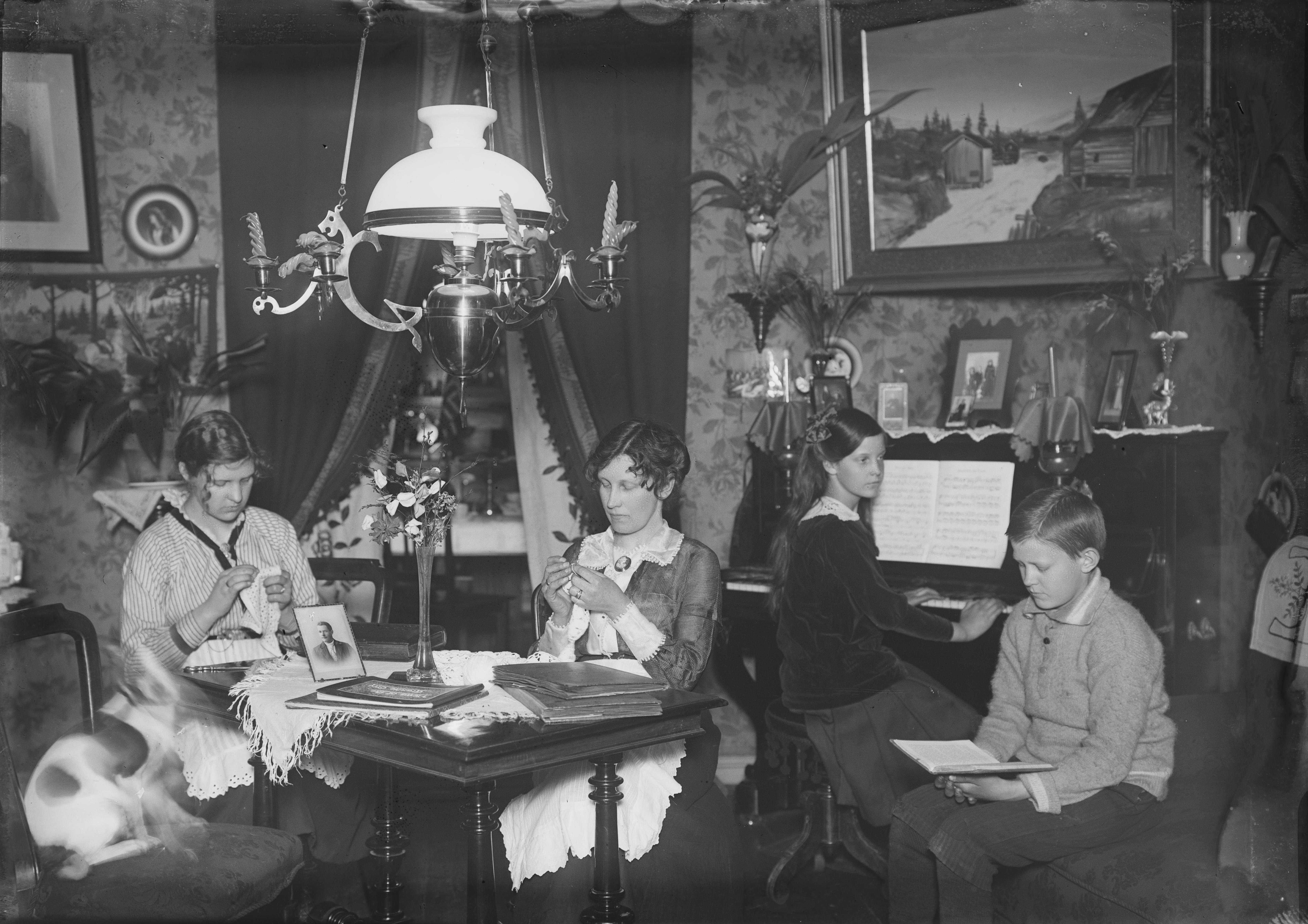 Bildet er hentet fra Nasjonalbibliotekets bildesamling. Anmerkninger til bildet var: Påskrift arkivark: Freberg, "Nordstrand" Arkivnummer: 189 Oslo, Oslo